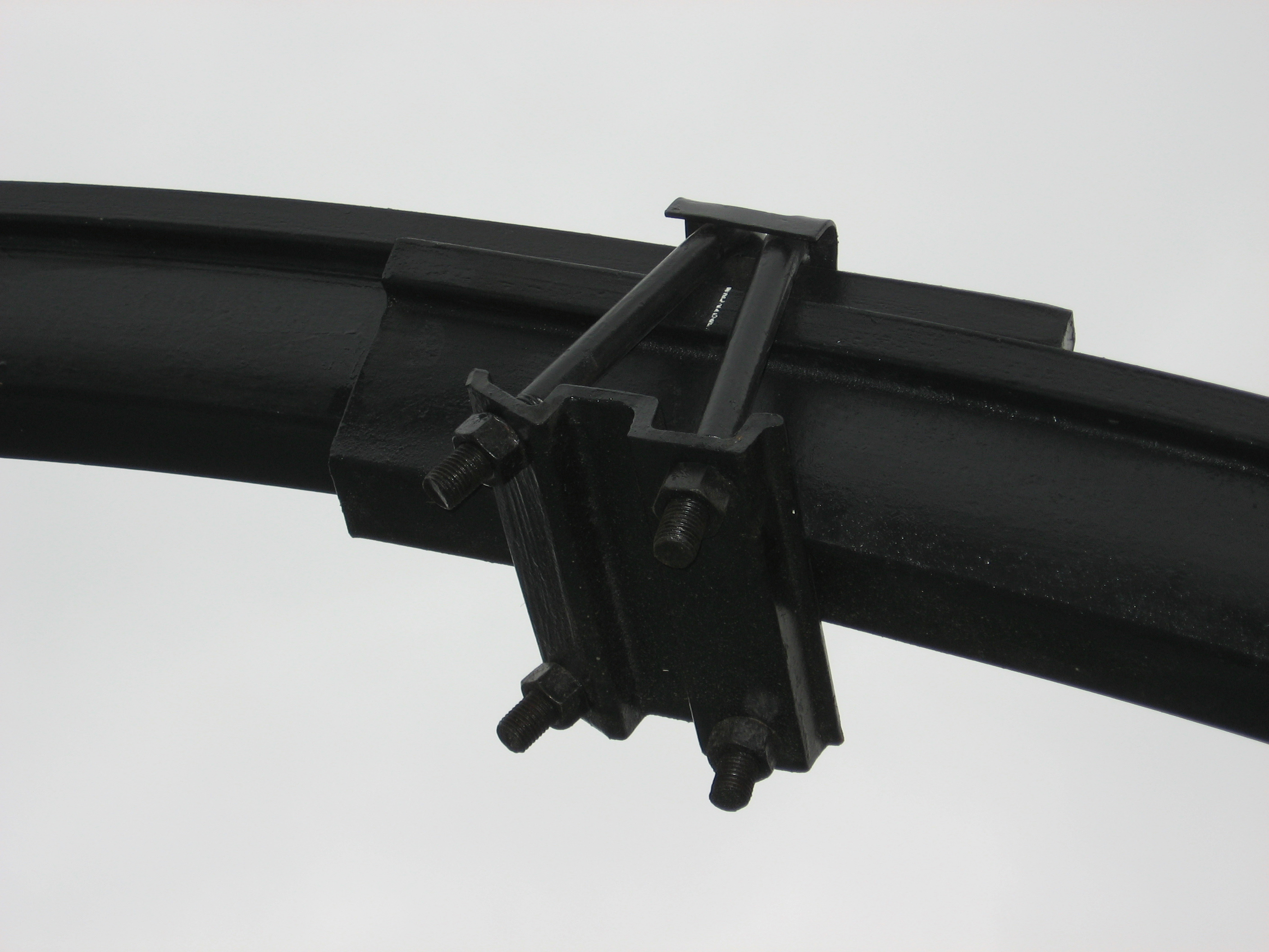 Фото з виставки Вугілля-Майнінг 2010